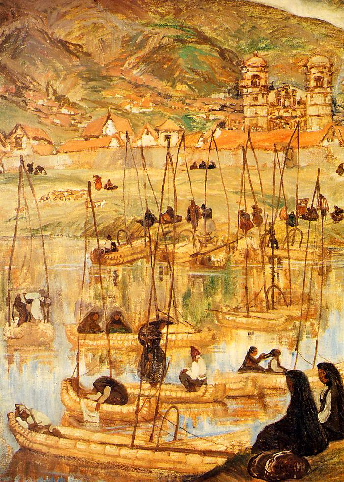 Caballitos de Totora, óleo de Jorge Vinatea Reinoso, pintor peruano. Hacia 1928-1931.